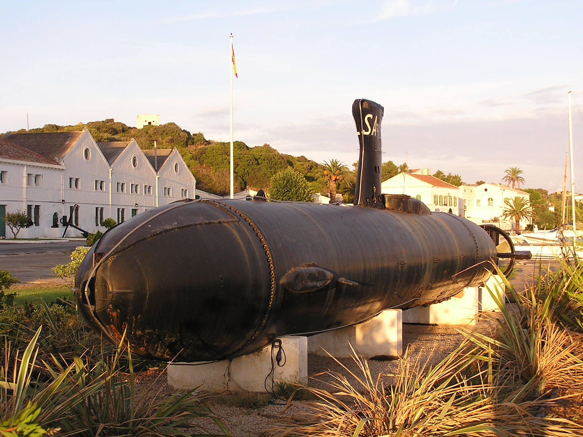 Pequeño submarino de asalto (SA 42) tipo Foca, unidad que se conserva en la Estación Naval de Mahón.